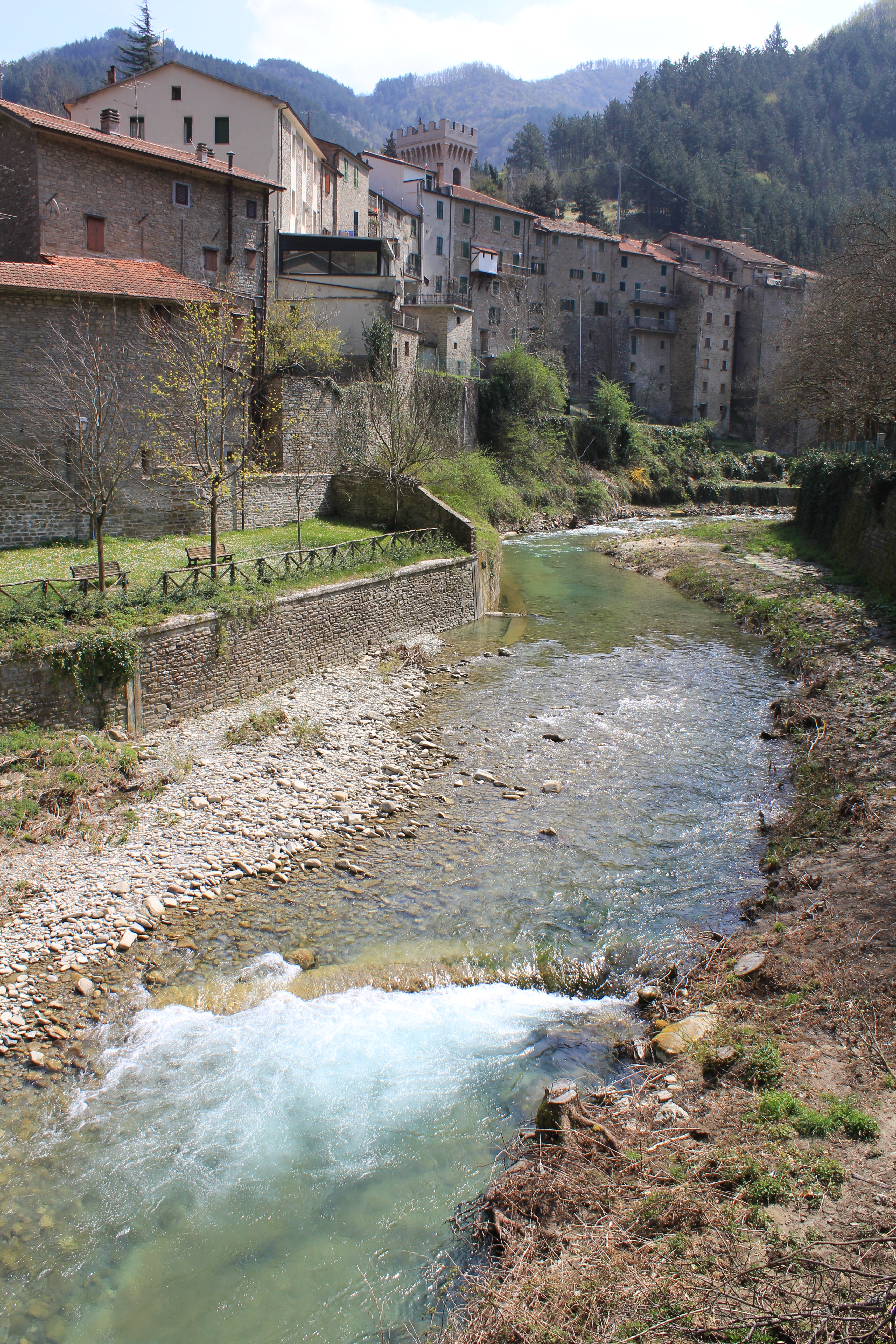 Fiume Rabbi This is a photo of a monument which is part of cultural heritage of Italy.